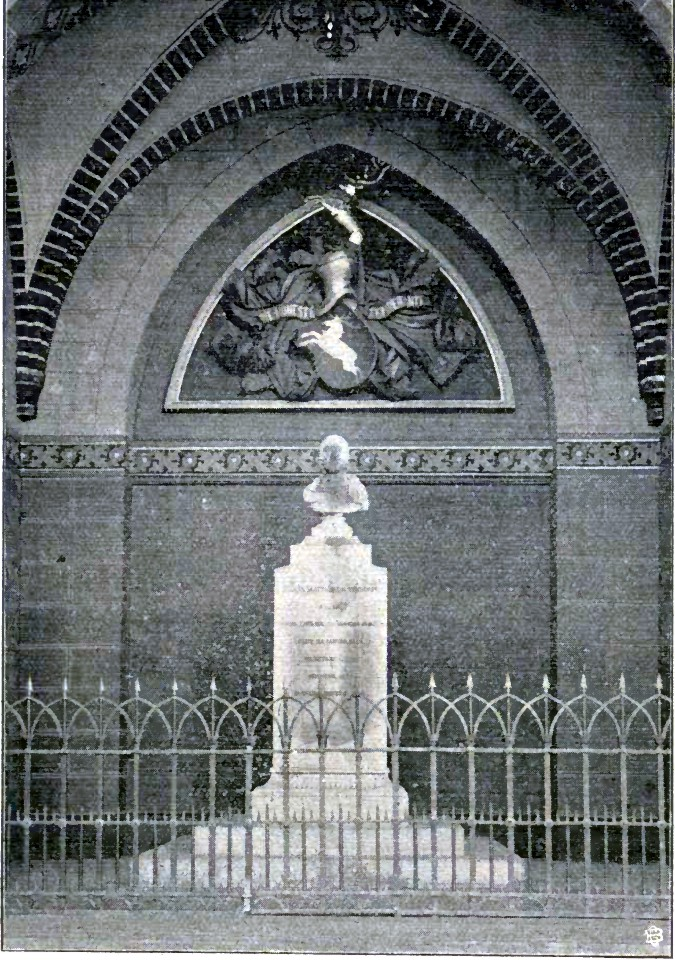 Bürgermeister Tesdorpf- oder Holthusen-Kapelle in der Marienkirche.